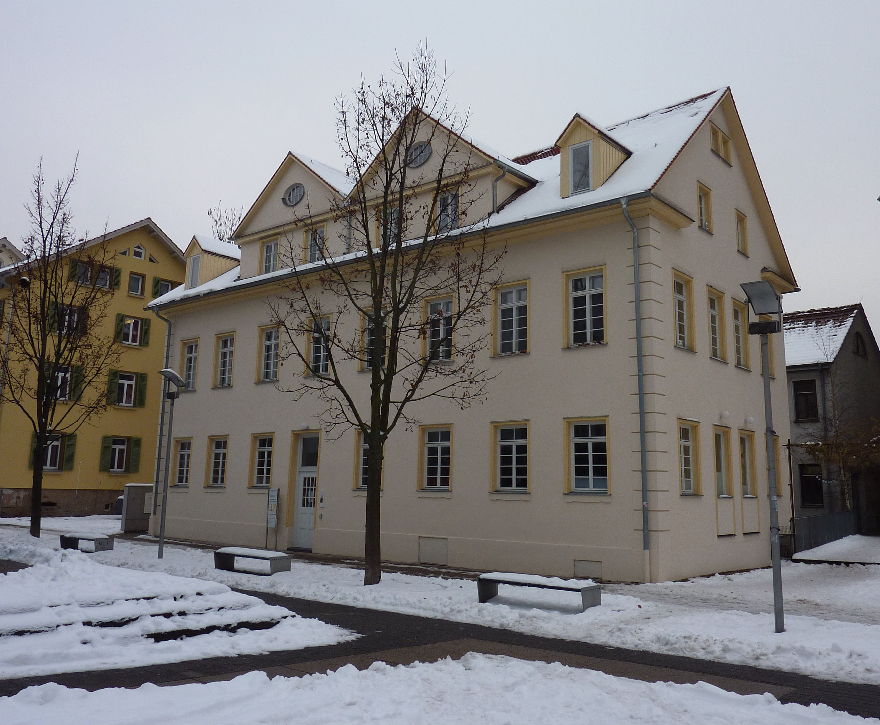 Kanalstr. 12/1 in Esslingen